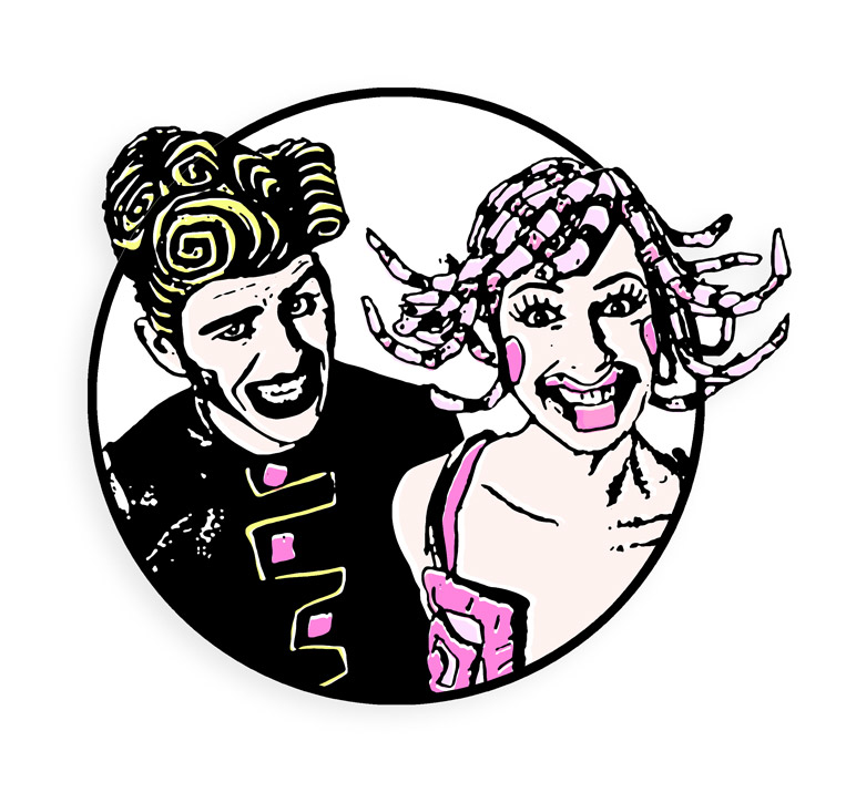 half past selber schuld erteilt durch Urheber